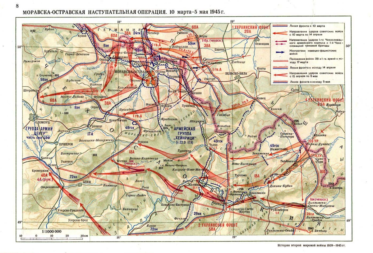 Ostravská operace